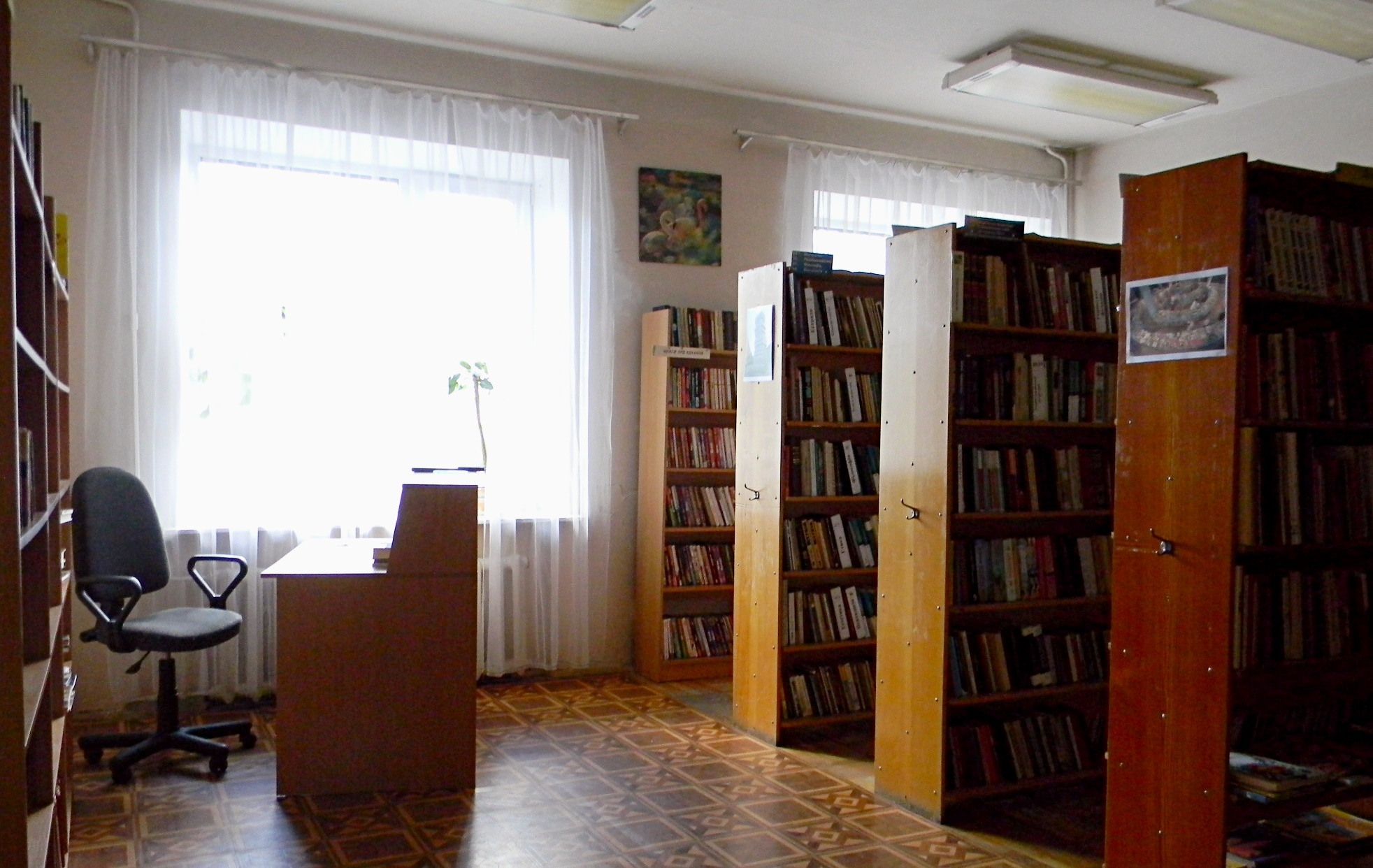 На абонементі представлені книжки, серед яких Ви знайдете твори українських письменників, російських, зарубіжних. Крім того, доступні видання по історії, соціології, правознавству, правильному харчуванню, рослинництву, та інші.